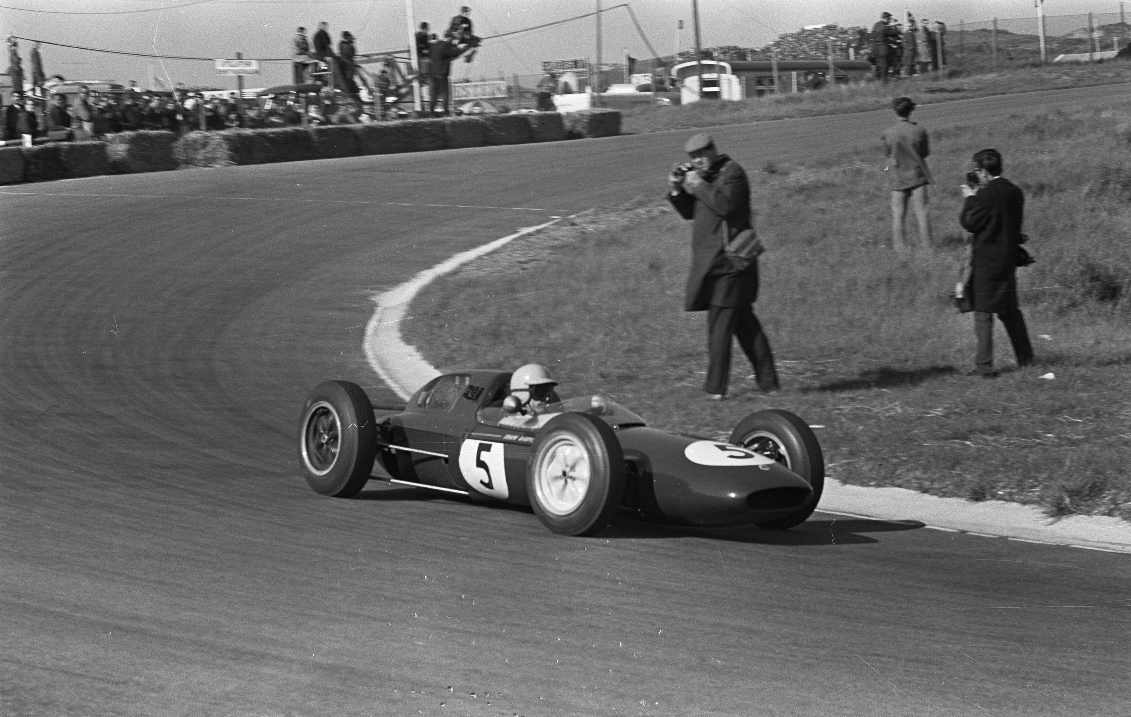 Grand Prix circuit te Zandvoort.